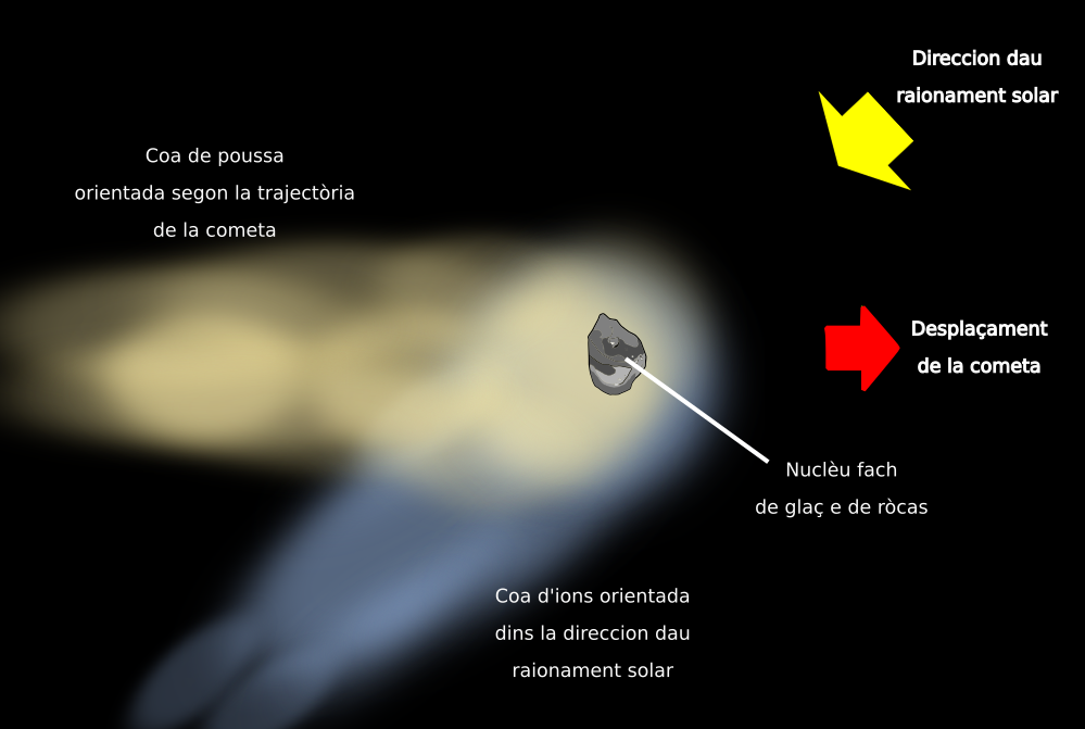 Esquèma simplificat d'una cometa.